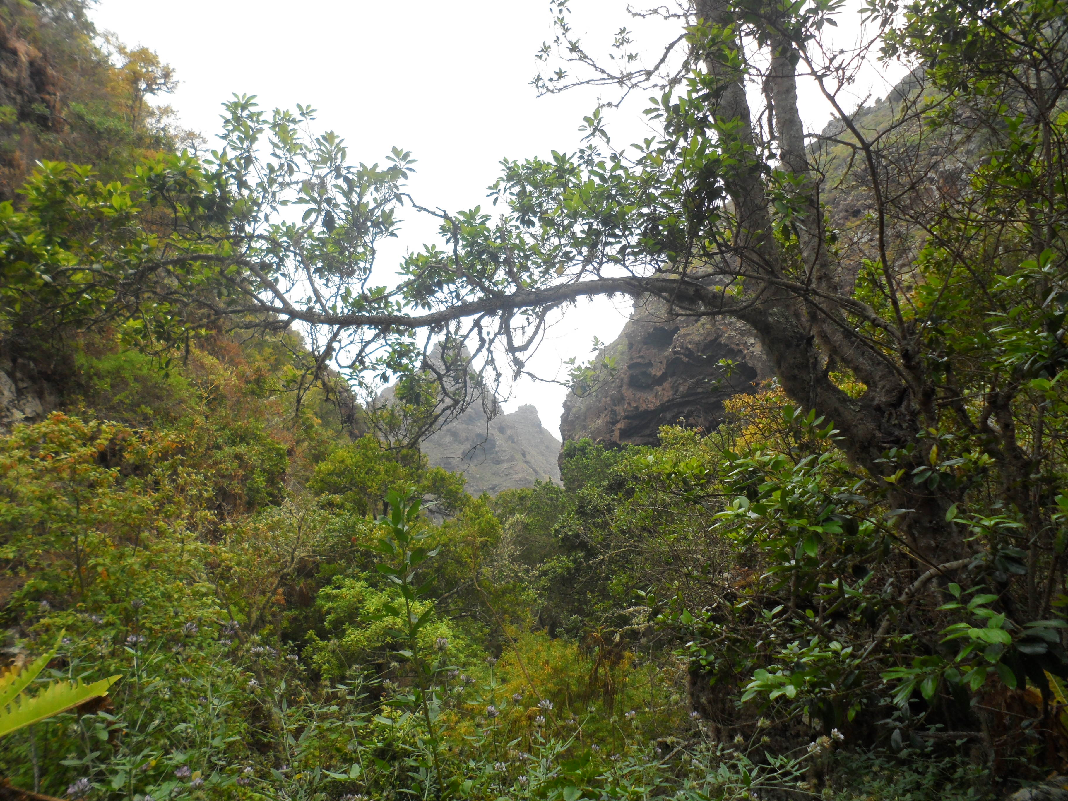 Monte del Agua 4, desde Erjos a Los Silos por camino Cuevas Negras